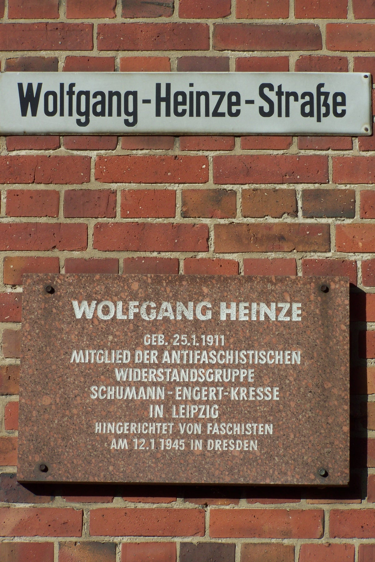 Stralsund, Wolfgang-Heinze-Gedenktafel (2008-10-10)